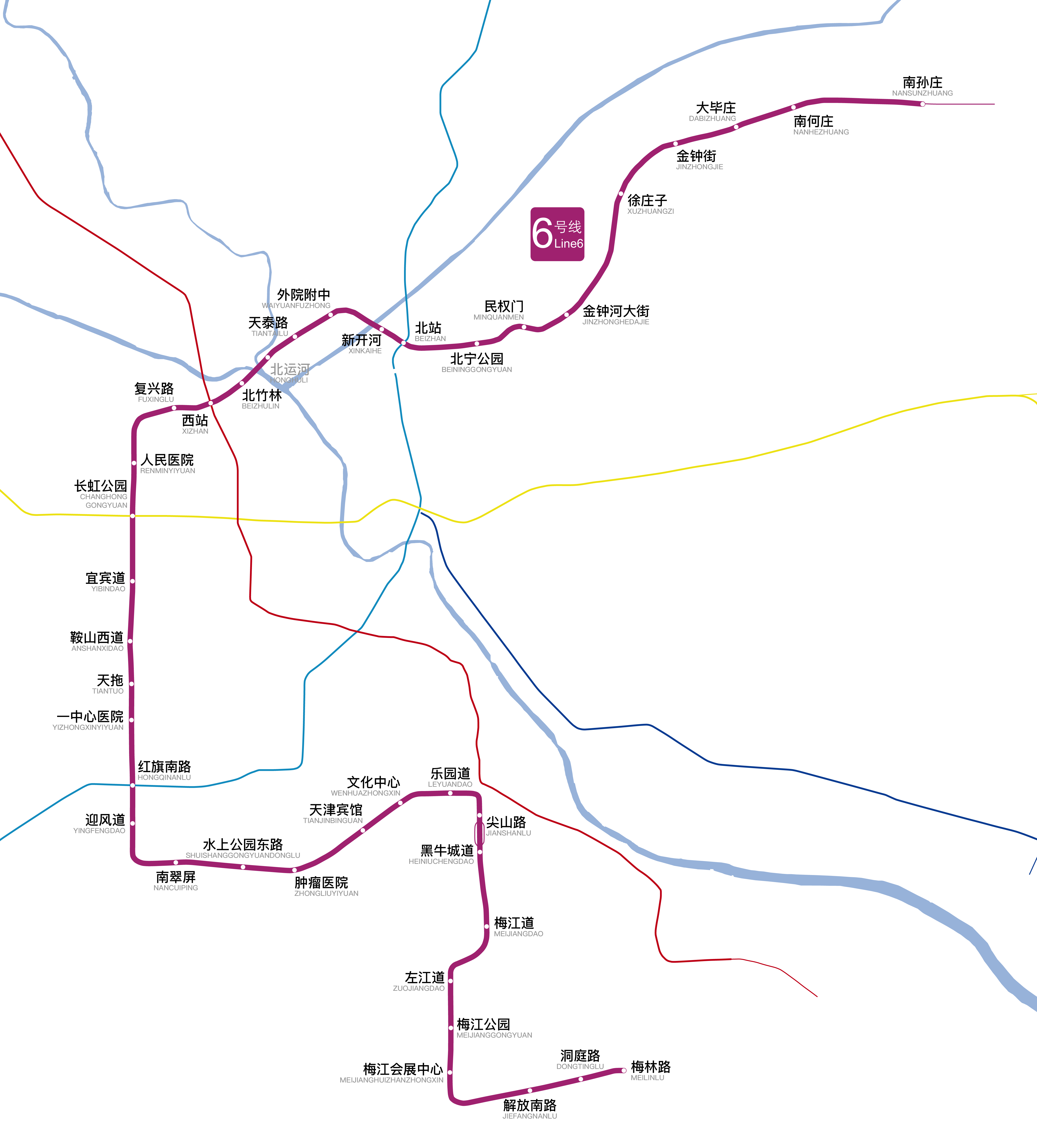 中文（中国大陆）: 天津地铁6号线线路图，更新于2018年6月